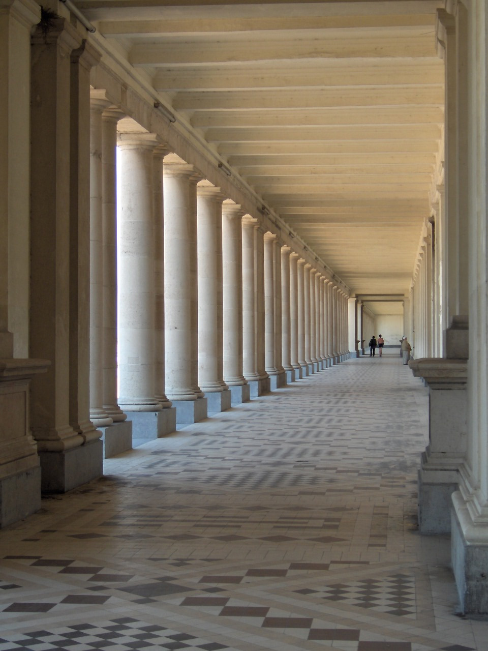 Koninklijke Gaanderijen, Ostend, Belgium